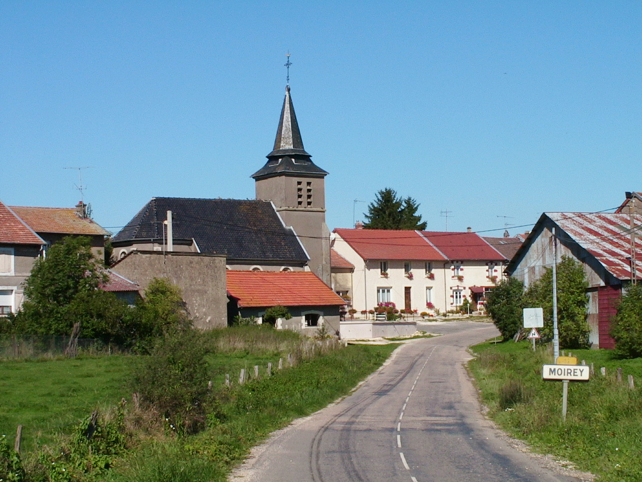 Eglise et village de Moirey (commune de Moirey-Flabas-Crépion (Meuse) Photo prise par F5ZV en automne 2005 Licensing Catégorie:Image de commune de la Meuse